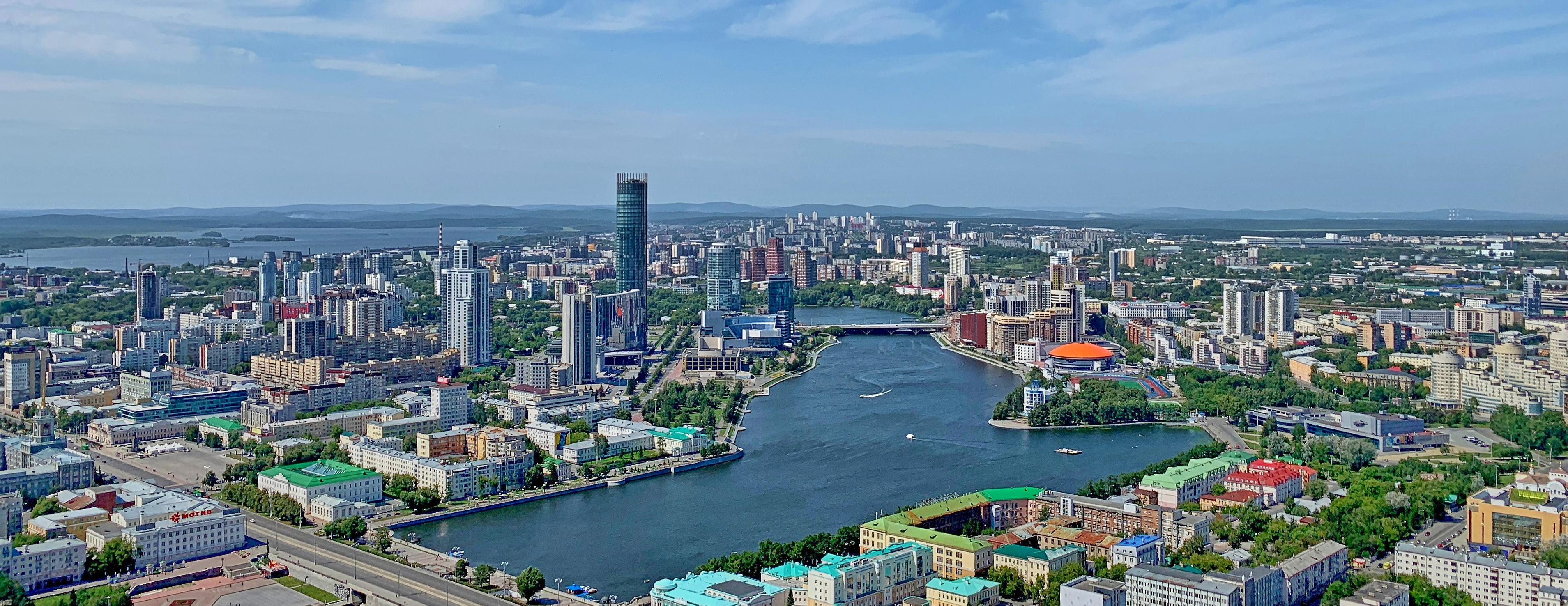 Вид на Екатеринбург с Высоцкого